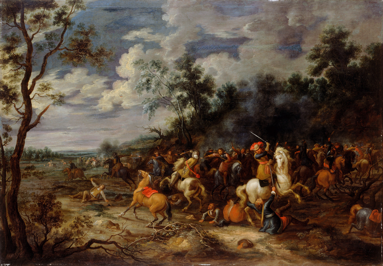 Konjeniška bitka